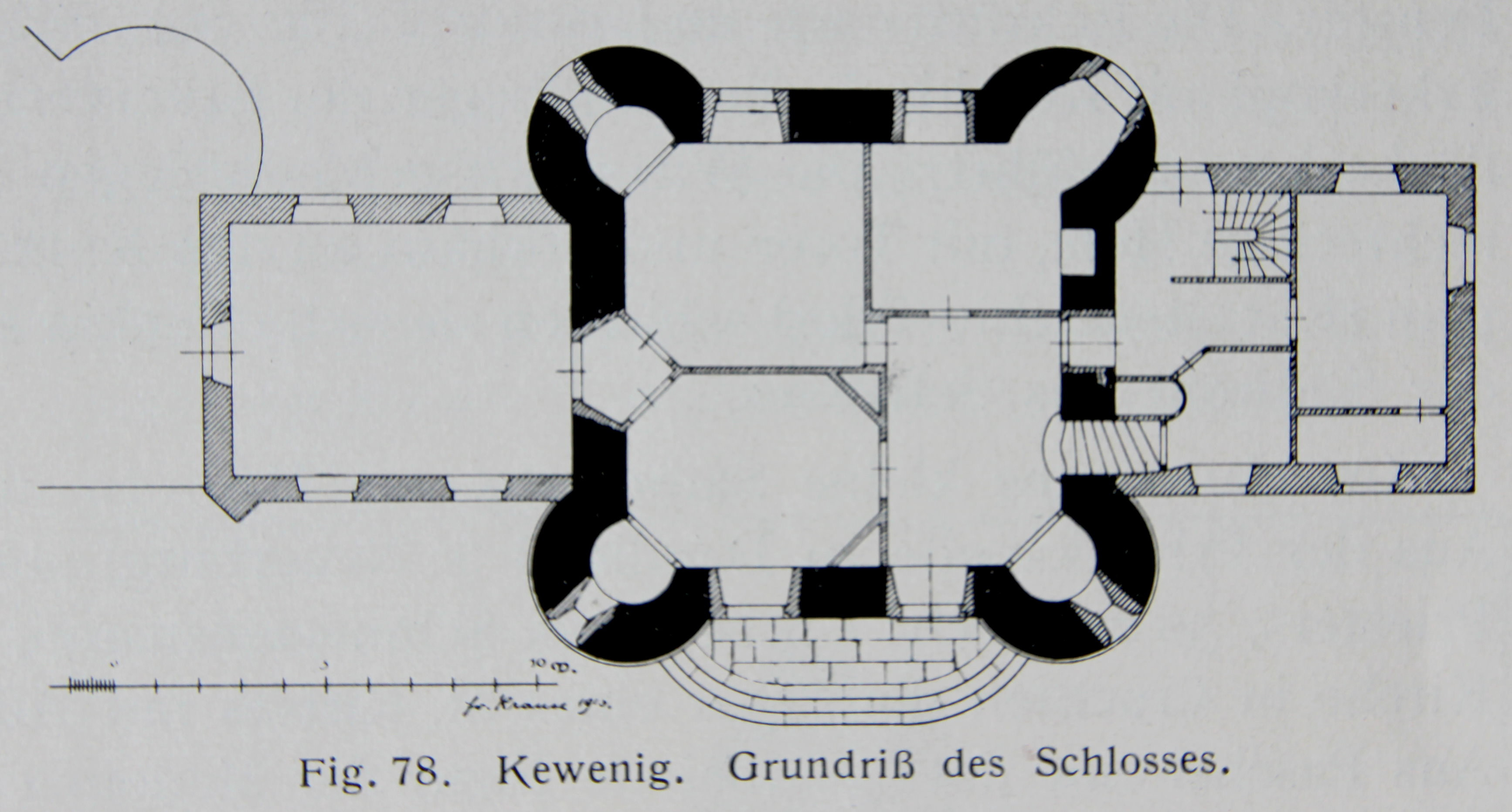 54675 Körperich, Schloss Kewenig 1. Schloss Kewenig zählt zu den ältesten Gutshäusem im Landkreis Bitburg-Prüm. Das Schloss wurde 793 durch Gerswindis dem Kloster Lorsch geschenkt und 1231 urkundlich als Villa de Cheweningen erwähnt. Einst Sitz der Herrn von Stein. Der Kern ist eine Wasserburg von quadratischem Grundriss mit Ecktürmen und Rundbogenfries des 16. Jahrhunderts (war 1816 verfallen und 1890-91 erweitert worden. Instandsetzung 1970-71). Scan von 2018.